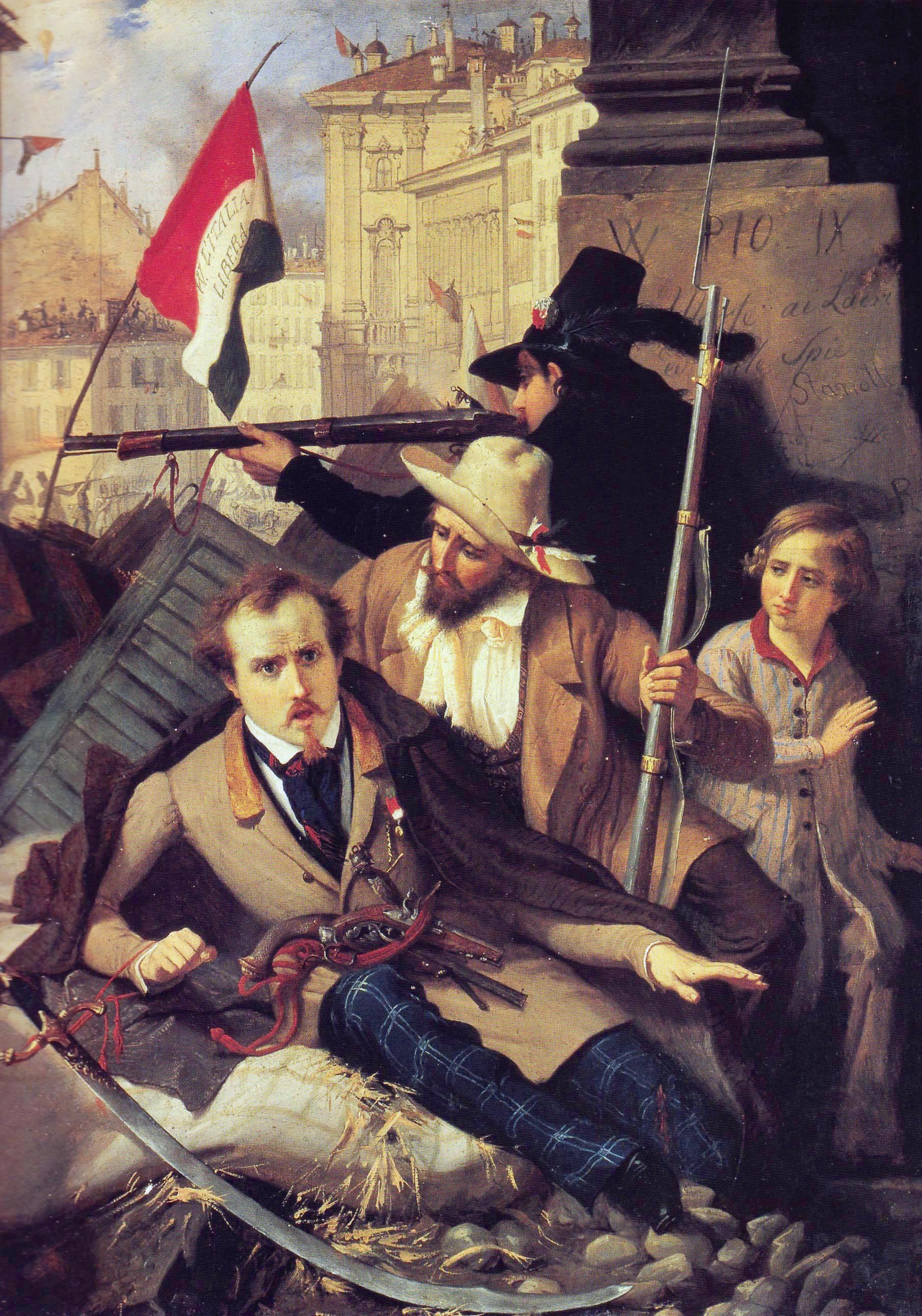 un épisode des cinq journées de Milan en 1848.title QS:P1476,fr:"un épisode des cinq journées de Milan en 1848." label QS:Lfr,"un épisode des cinq journées de Milan en 1848."